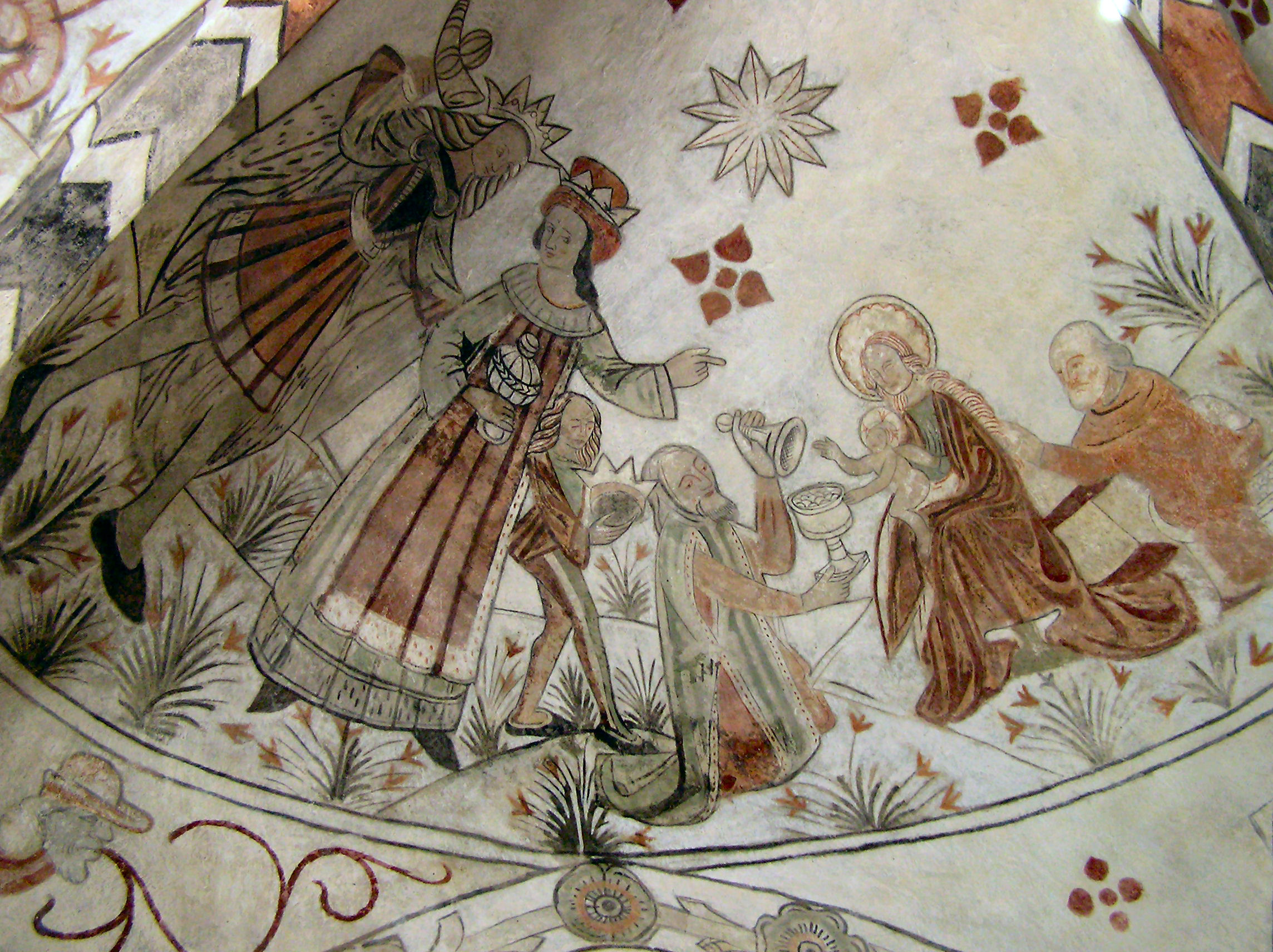 Vesterø Kirke, Læsø, Kalkmalerier